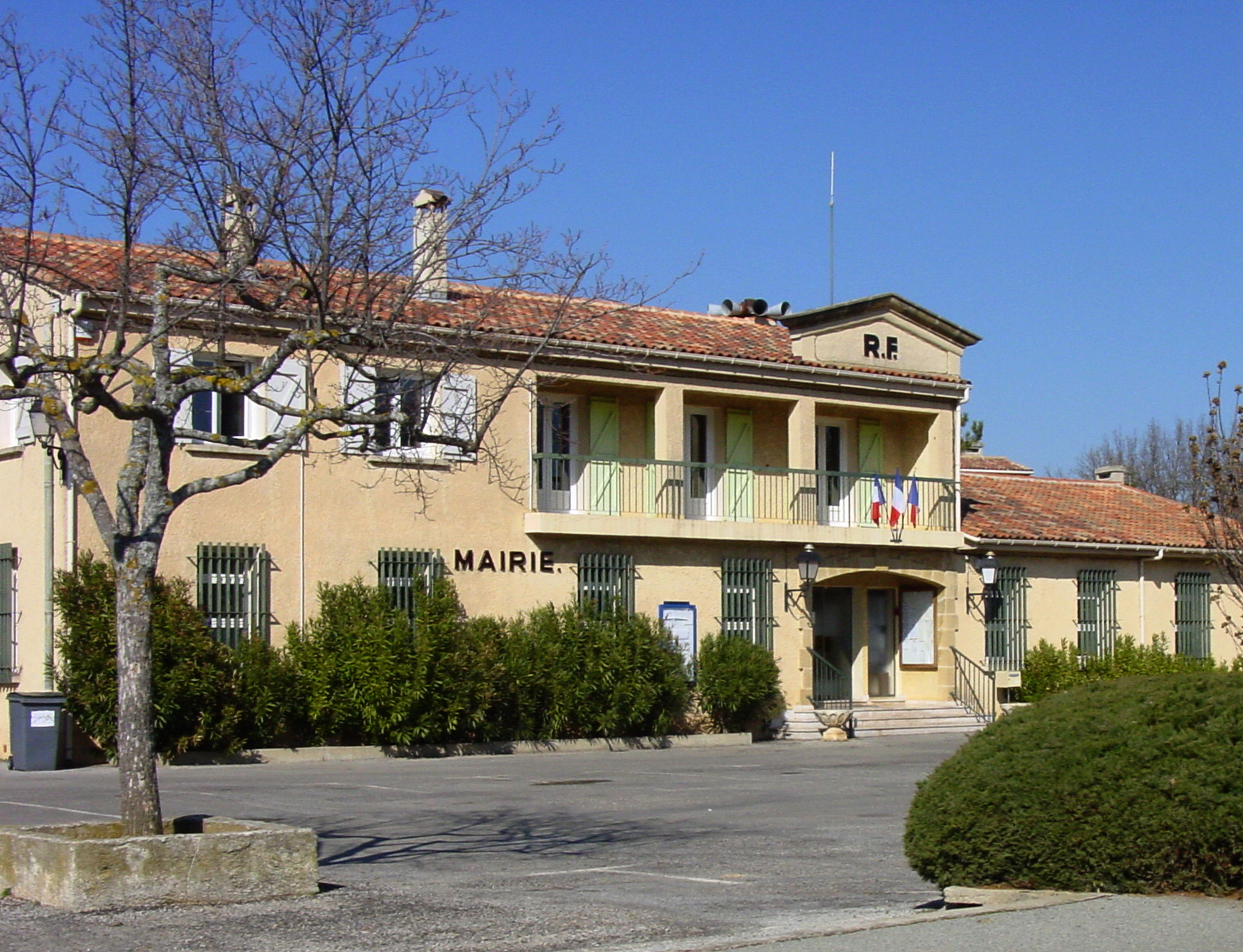 Hôtel de Ville de Nans-les-Pins